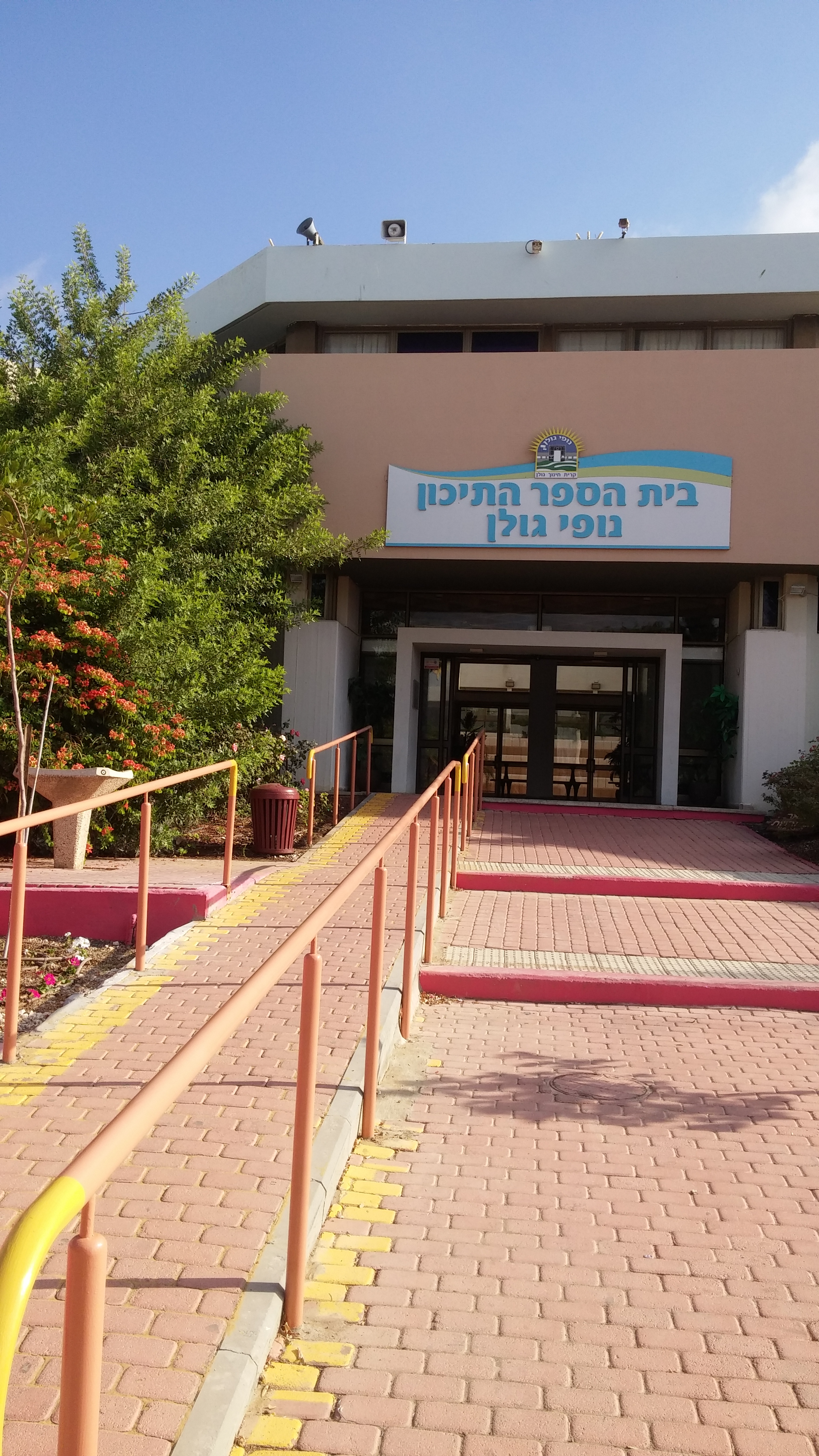 נופי גולן